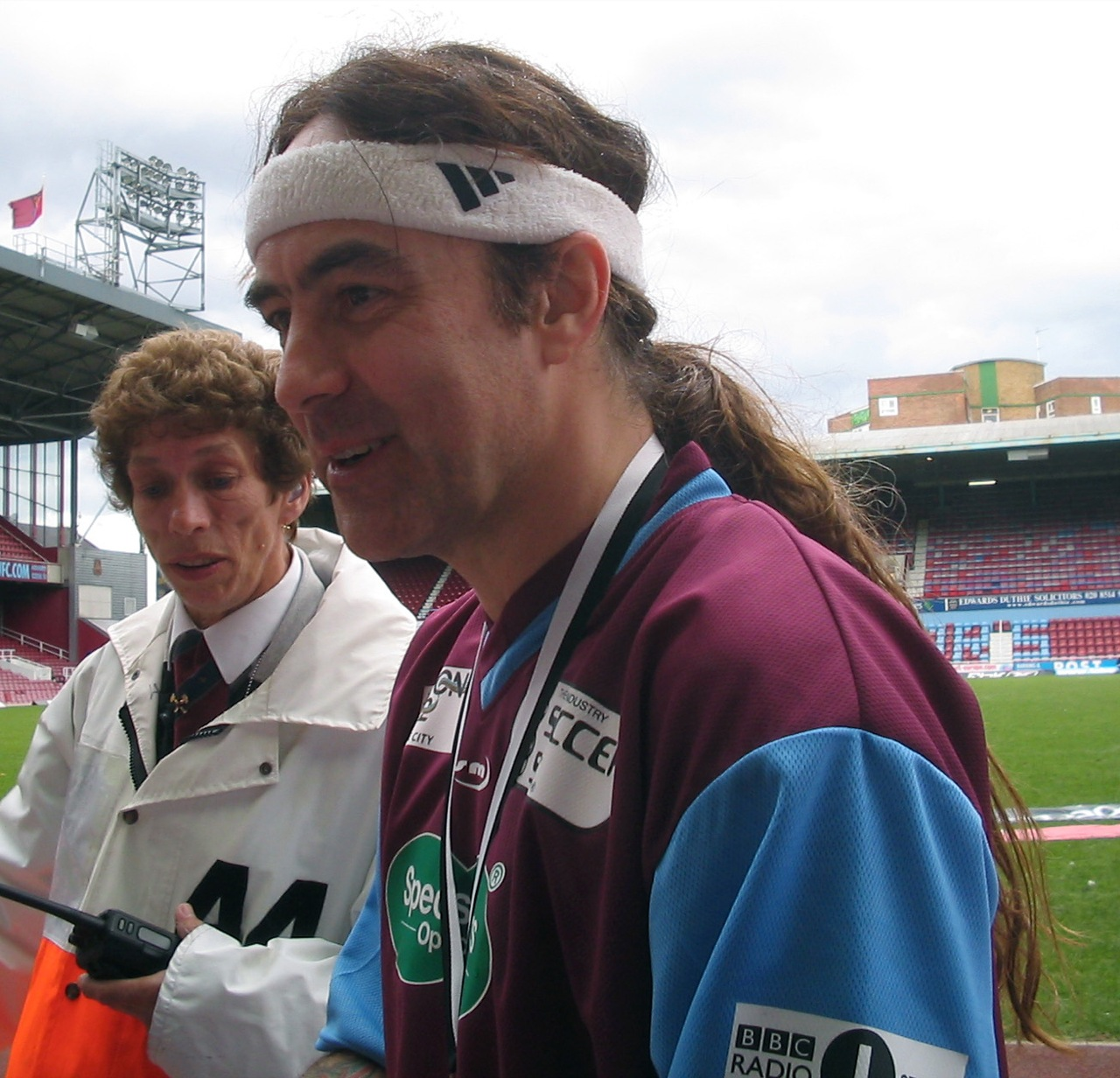 Steve Harris, bajista de Iron Maiden, participando en un partido benéfico.